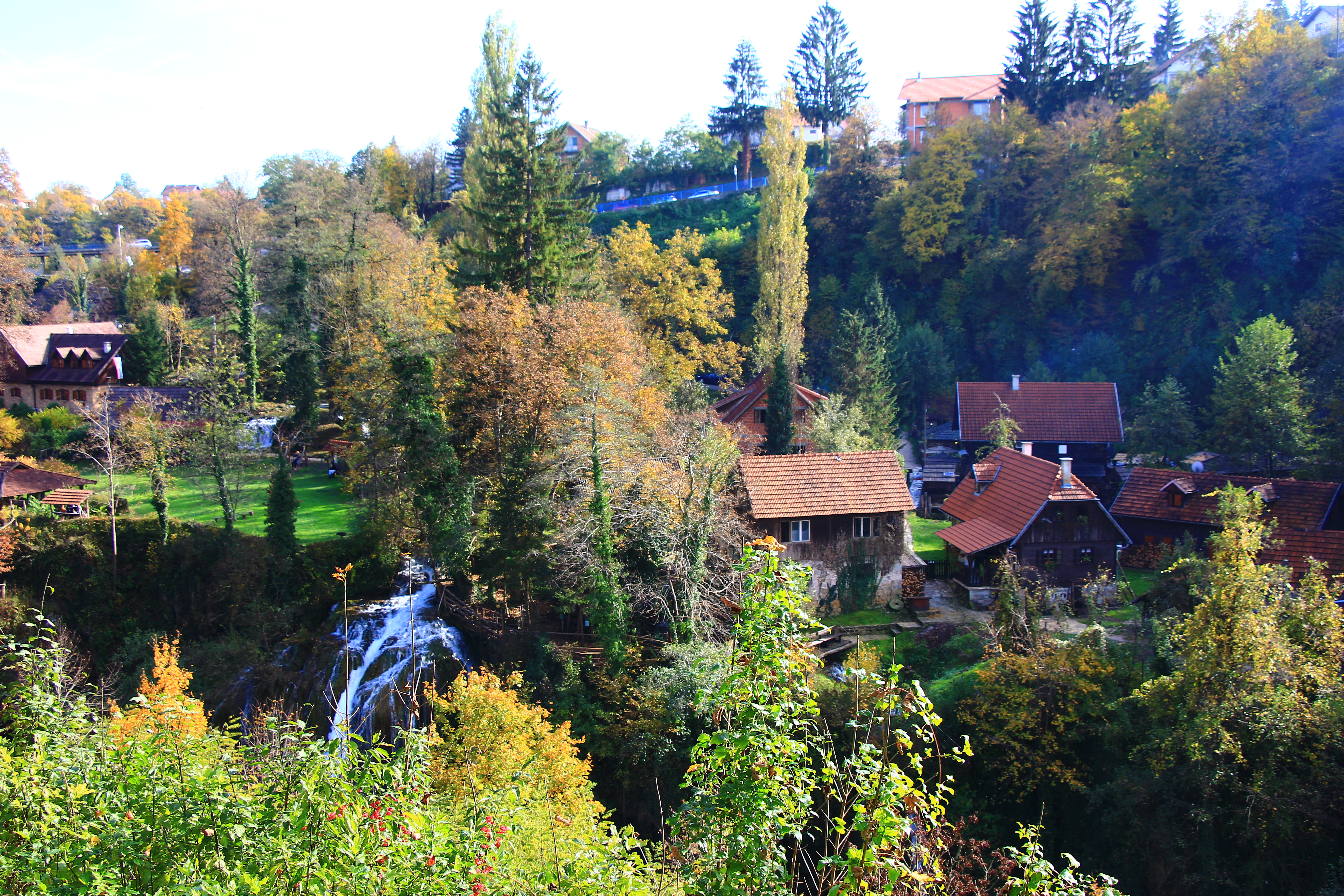 Rastoke mit seinen Wasserfälllen, Teil der Stadt Slunj in Kroatien